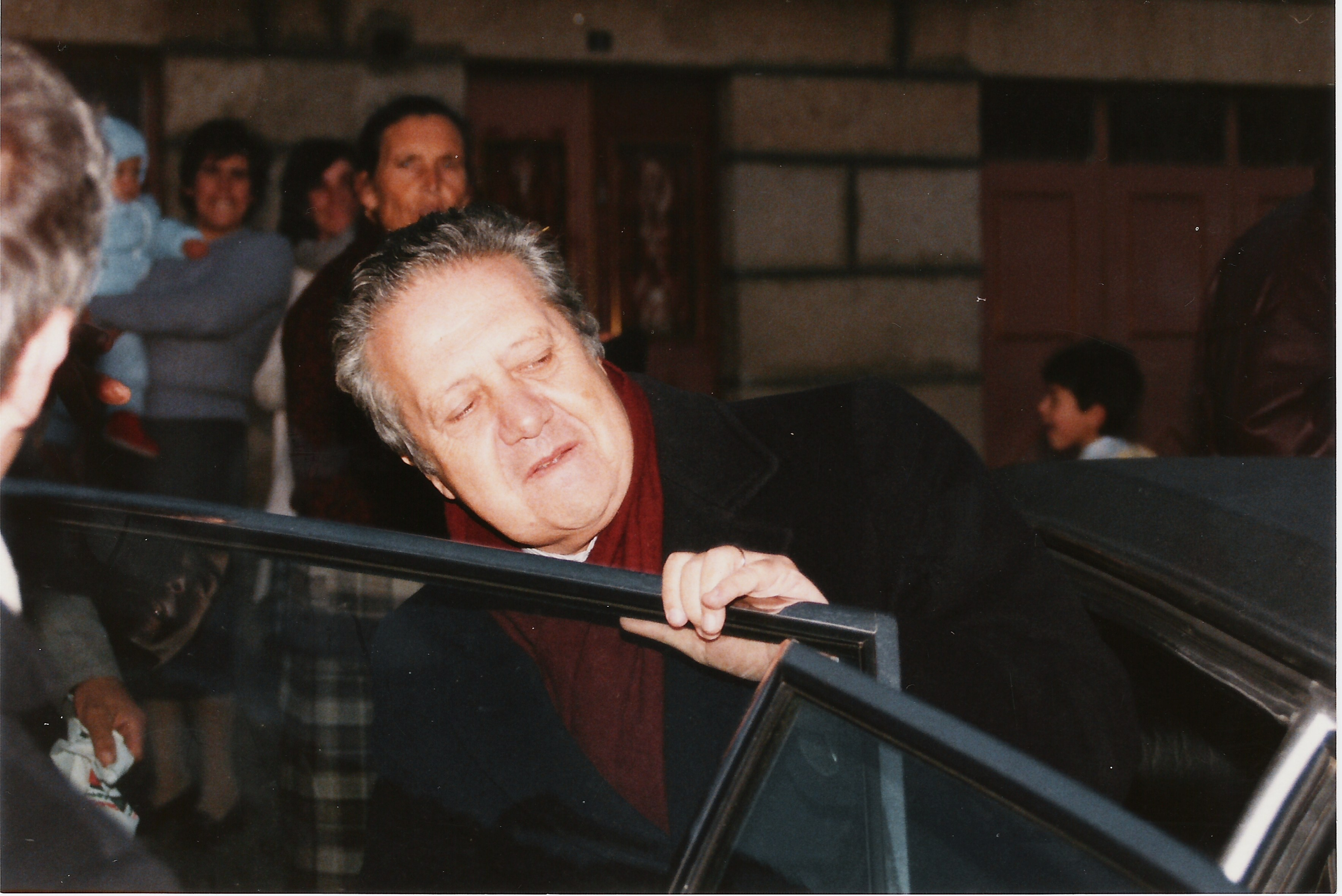 Foto analógica digitalizada, tirada em Muxagata durante a campanha para a presidência, em Janeiro de 1986.